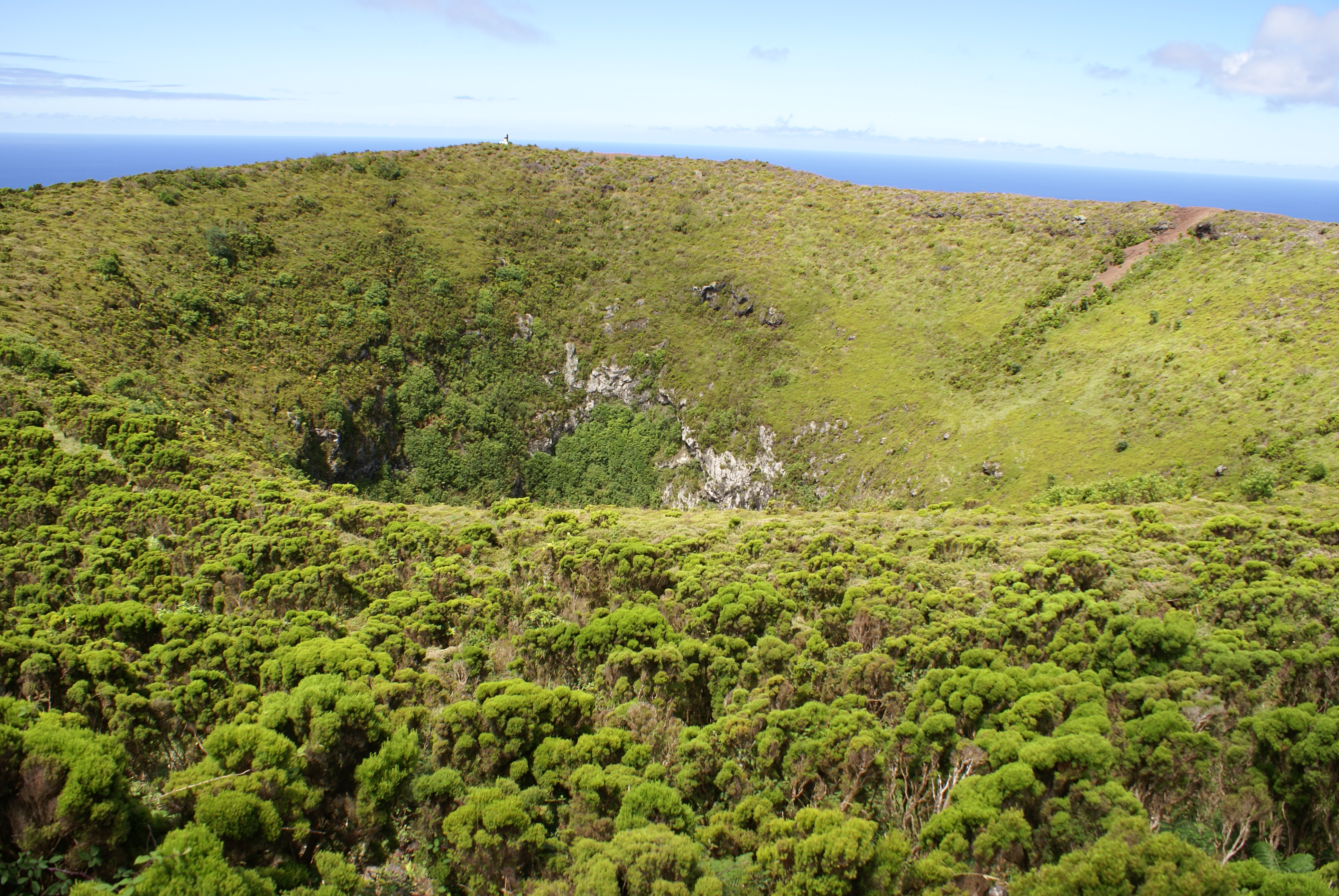 Pico da Caldeirinha, cratera, Santa Cruz da Graciosa, ilha Graciosa, Açores, Portugal